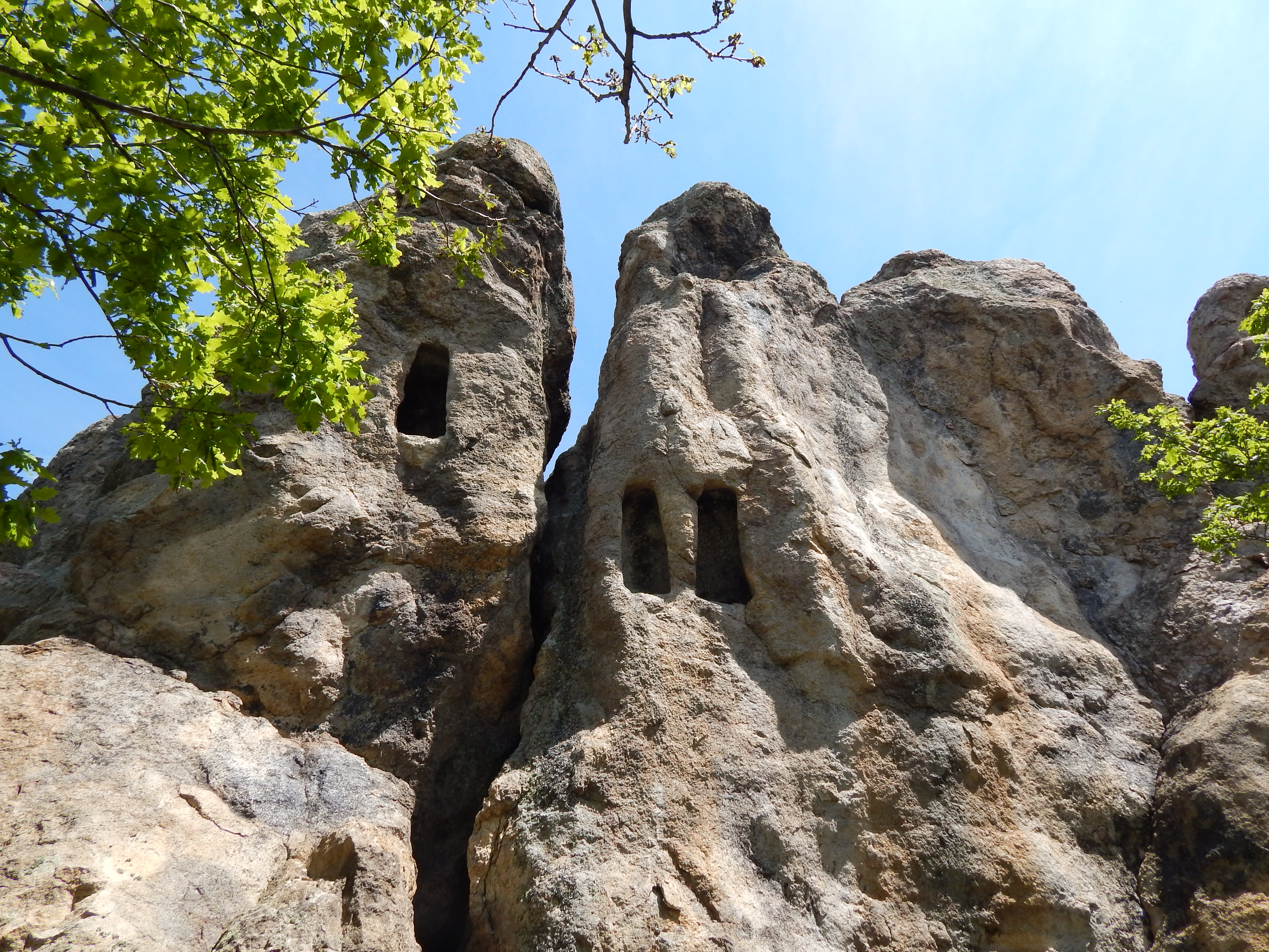 Орлови скали край с. Сърница, Хасковско с характерните трапецовидни ниши.